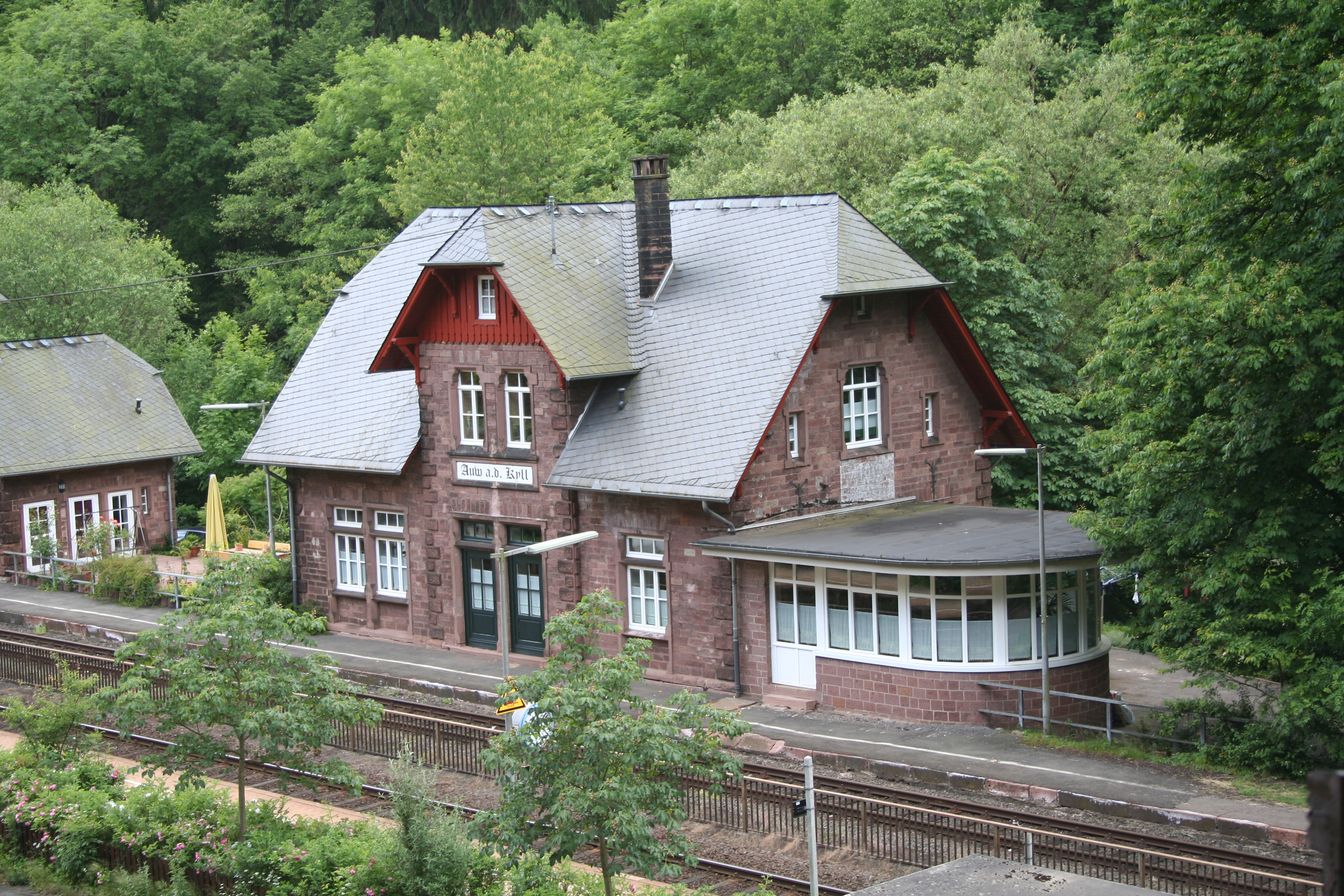 Bahnhof von Auw